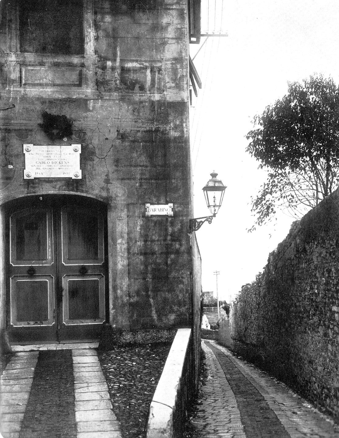 Genova, via San Nazaro in un dagherrotipo ottocentesco (Immagine messa a disposizione da Paola)